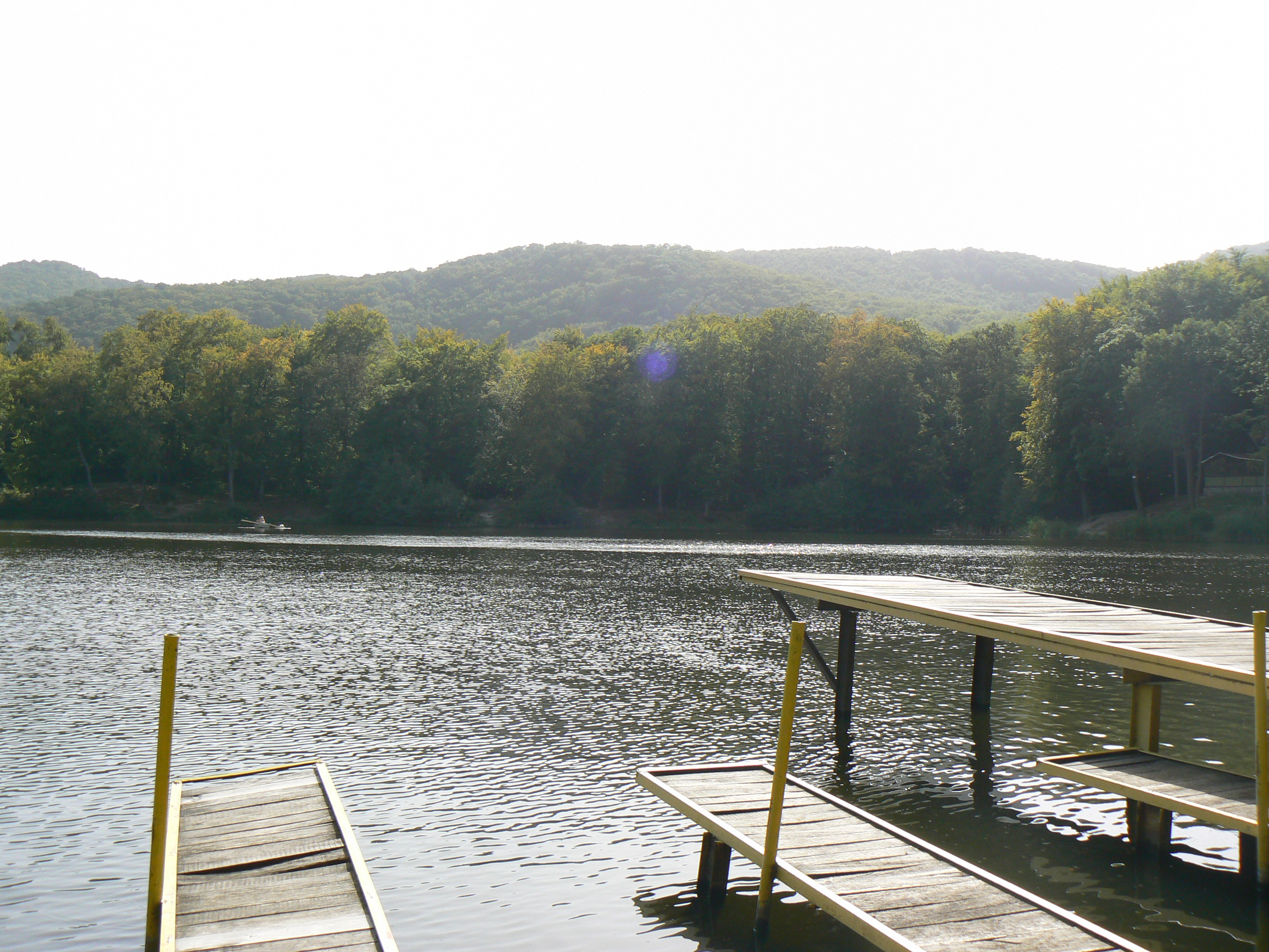 Jazero Izra